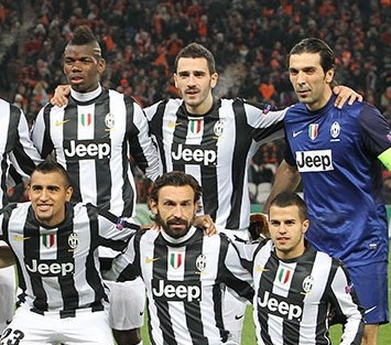 Joueurs de la Juventus de Turin (saison 2012-2013)